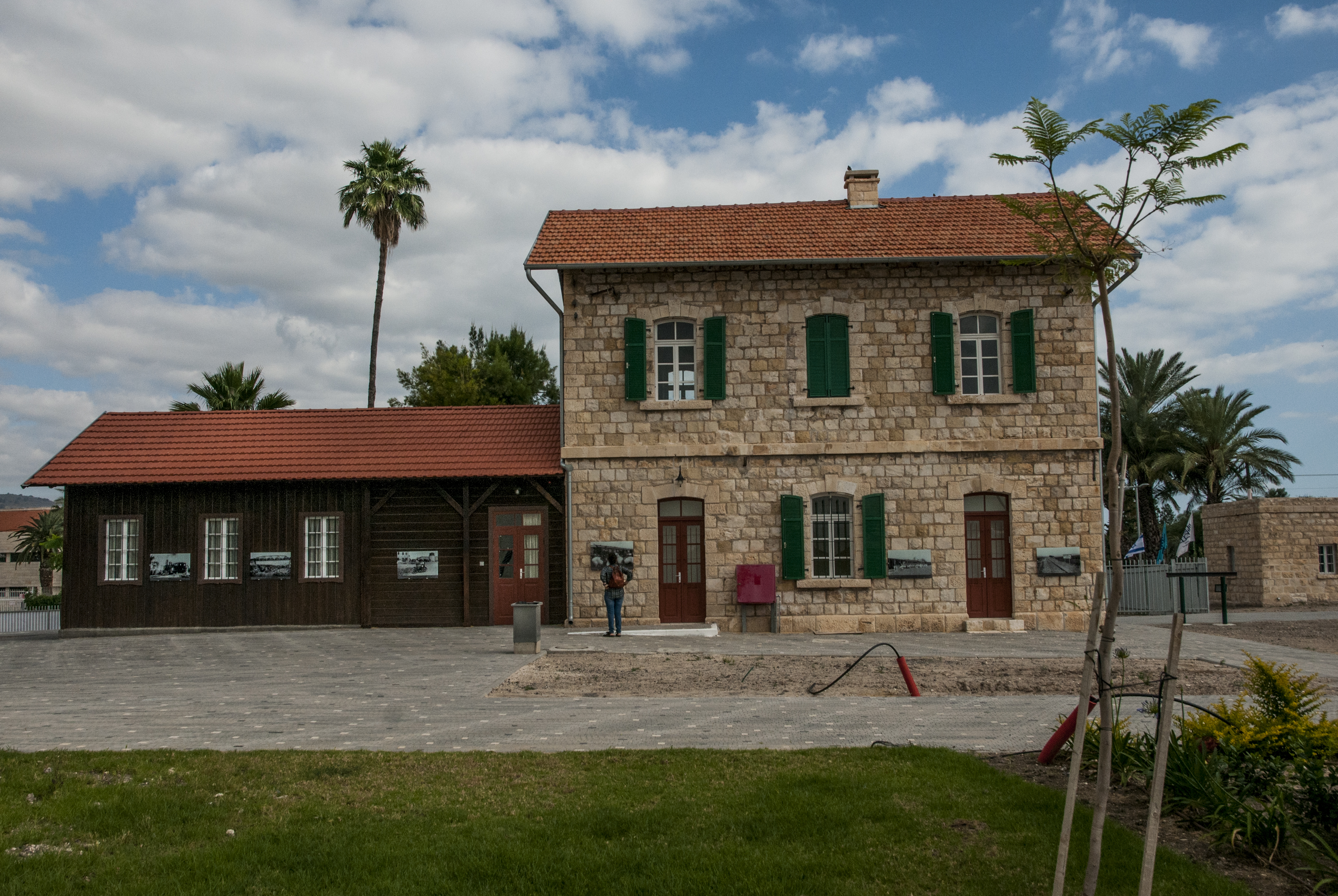 תחנת הרכבת סמח' הייתה תחנת הרכבת של העיירה הערבית סמח' שהייתה בדרומה של הכנרת עד למלחמת העצמאות. התחנה היא שריד לרכבת העמק.